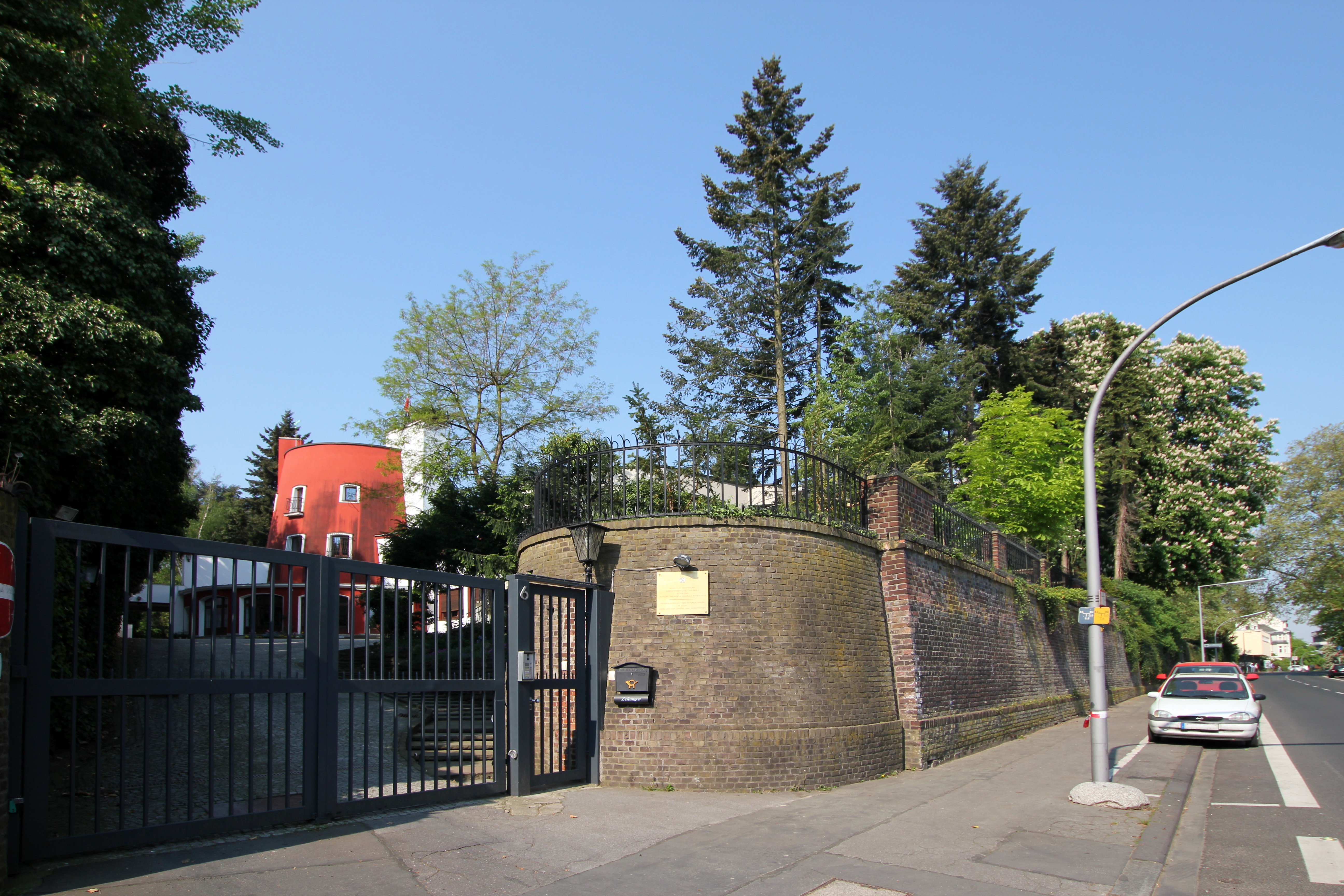 Köln-Marienburg, An der Alteburger Nühle 6, Alteburger Mühle This is a photograph of an architectural monument.